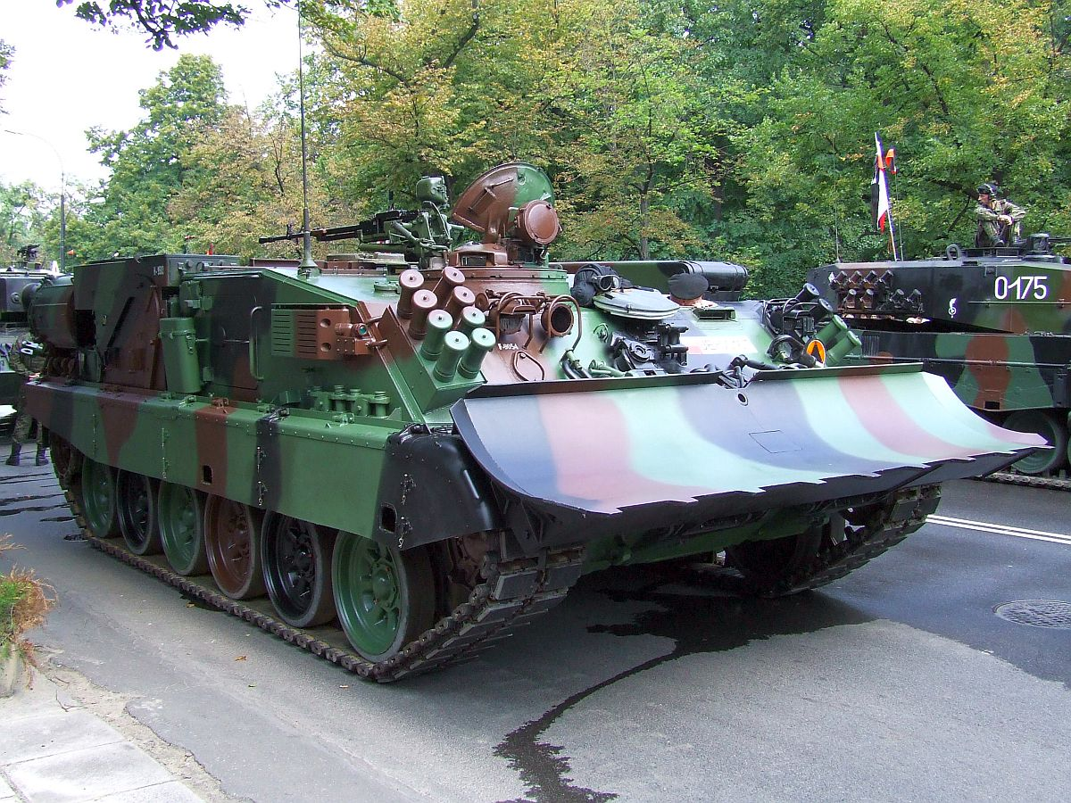 WZT-3, Warsaw